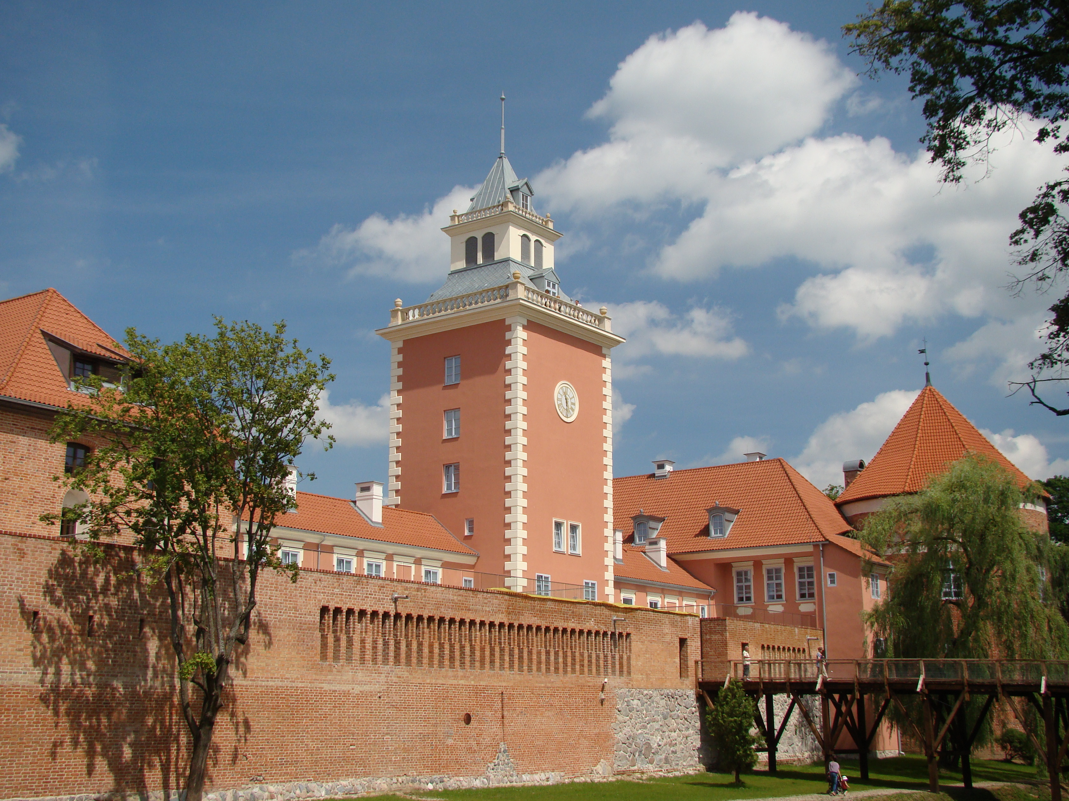 podzamcze